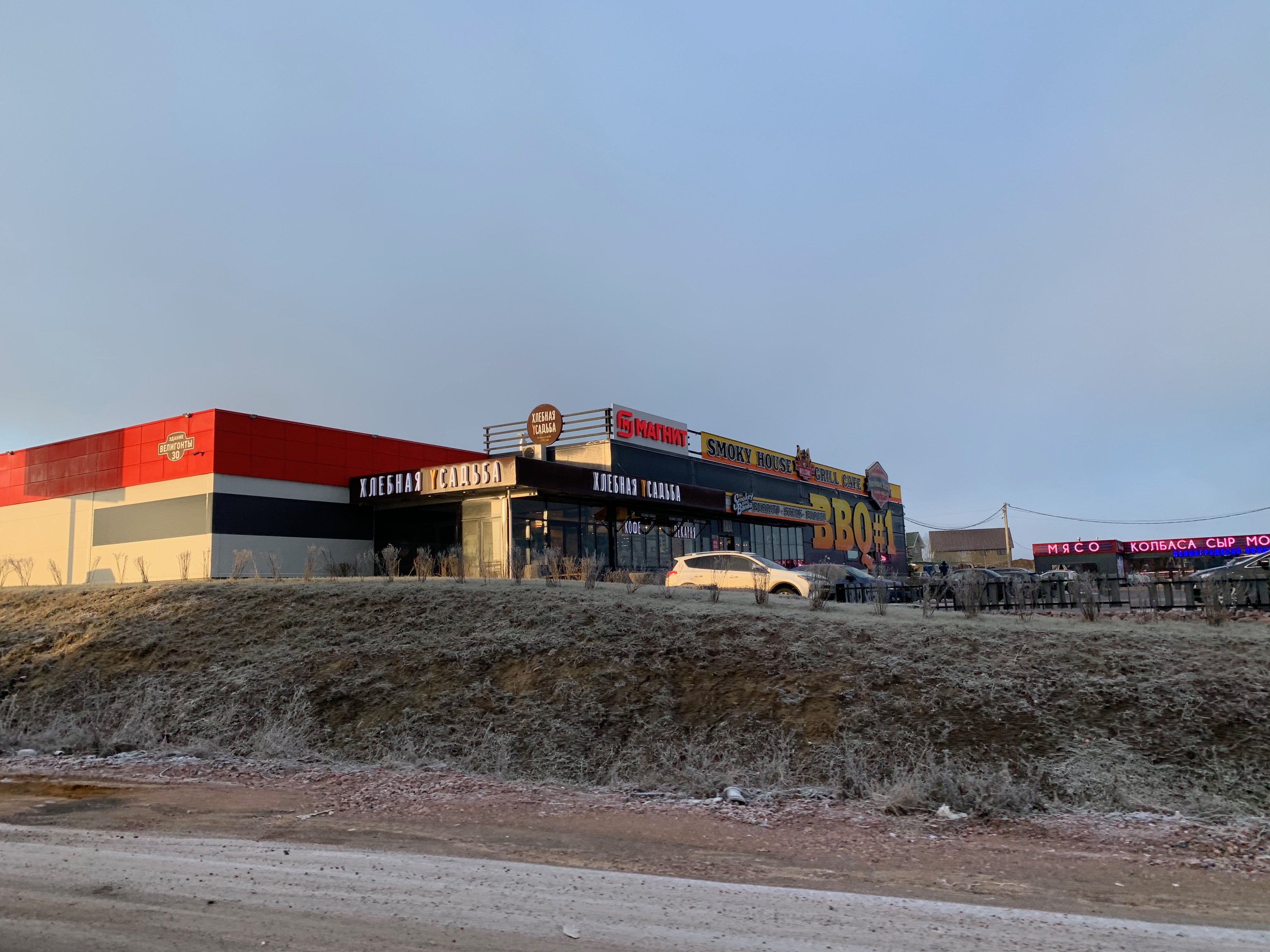 Велигонты